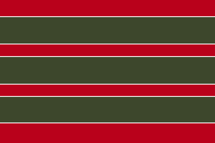 Bandera Villavente de la Sobarriba